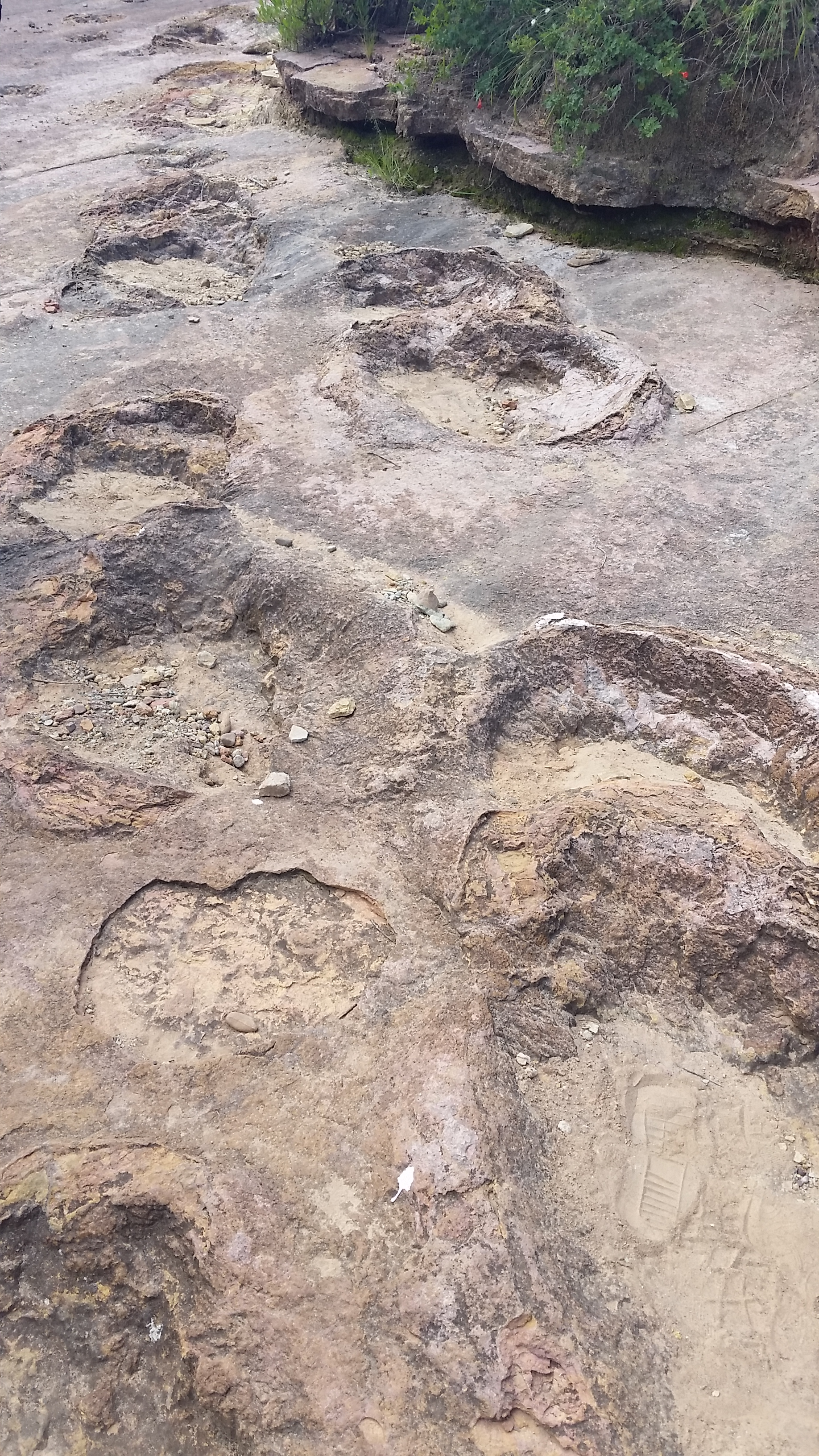 עקבות רגליים של דינוזאורים בפארק טורוטורו